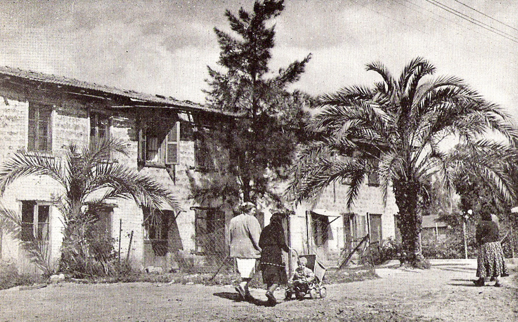 המושבה עקרון, היום he:מזכרת בתיה, בשנת 1950 לערך